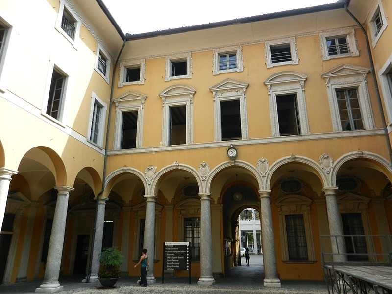 Como - Cortile di Palazzo Cernezzi (Municipio)